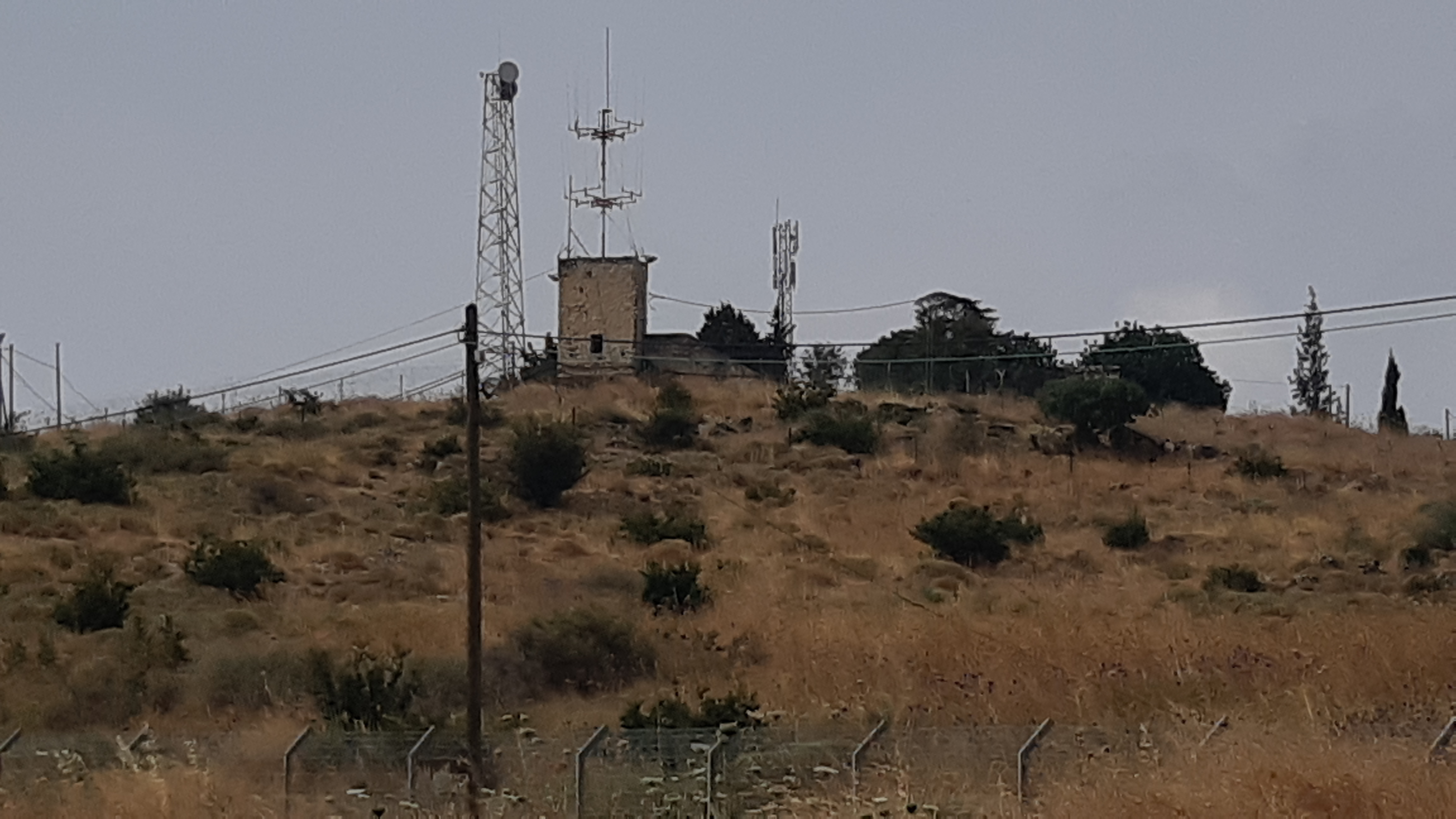 מצודת רמות נפתלי